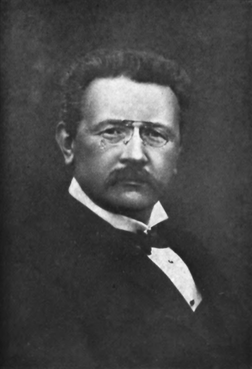 Hornjoserbsce: Adolf Sommer (1862–1909); serbski wučer, spisowaćel a kulturny prócowar.